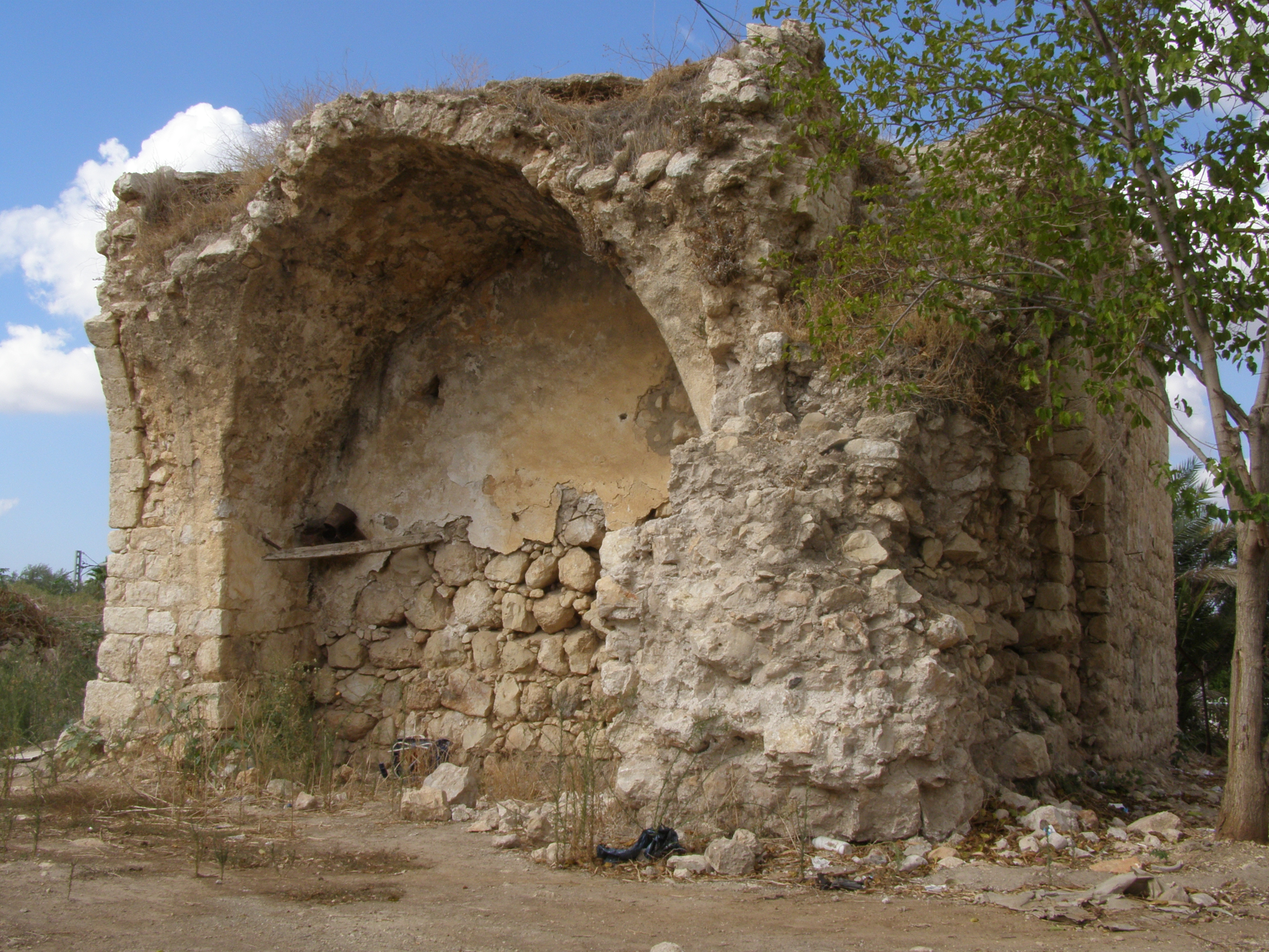 המשך מערכת המבנים ליד בית המוכתר. צולם ביישוב ברקת.